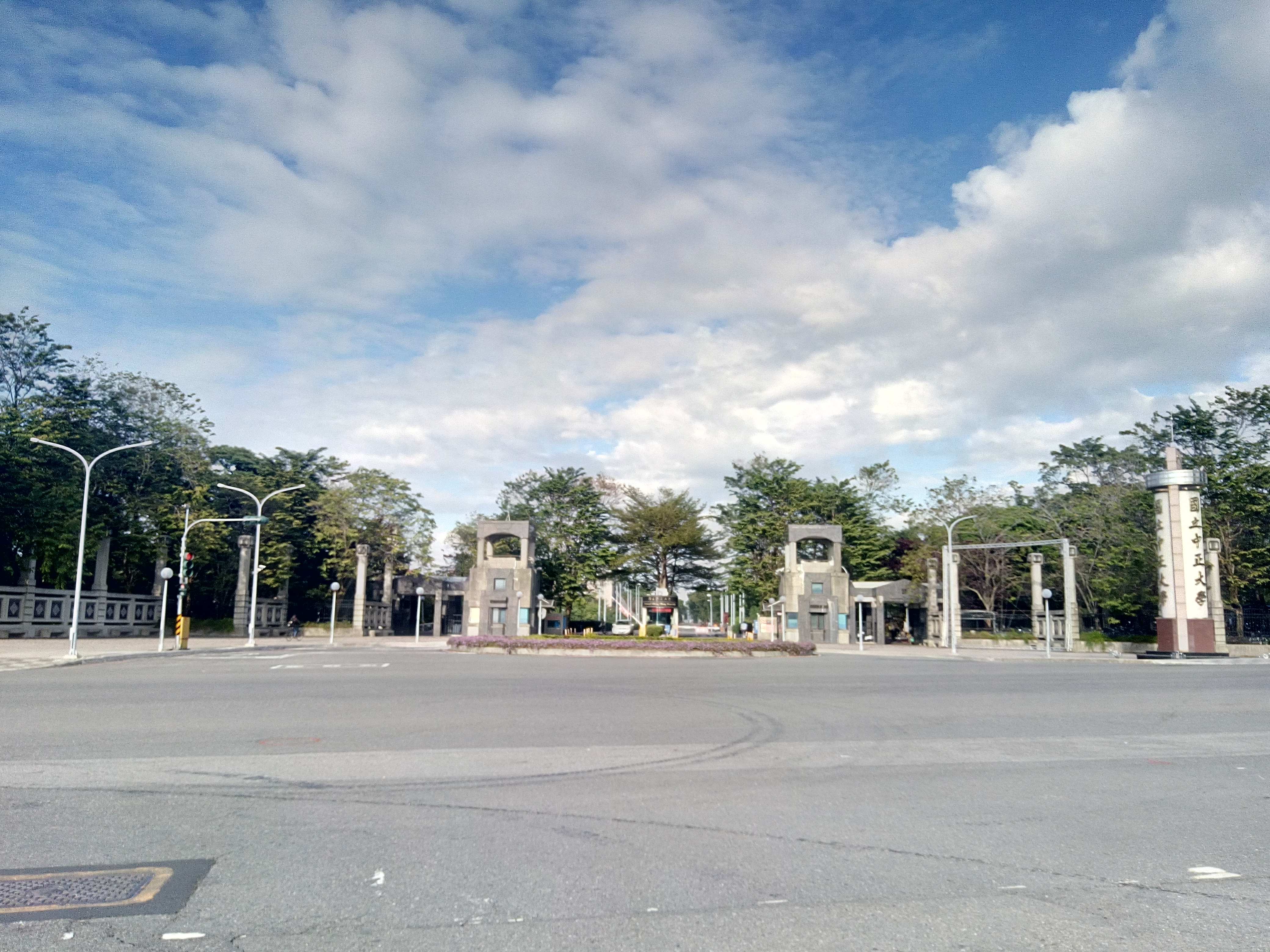 國立中正大學正門